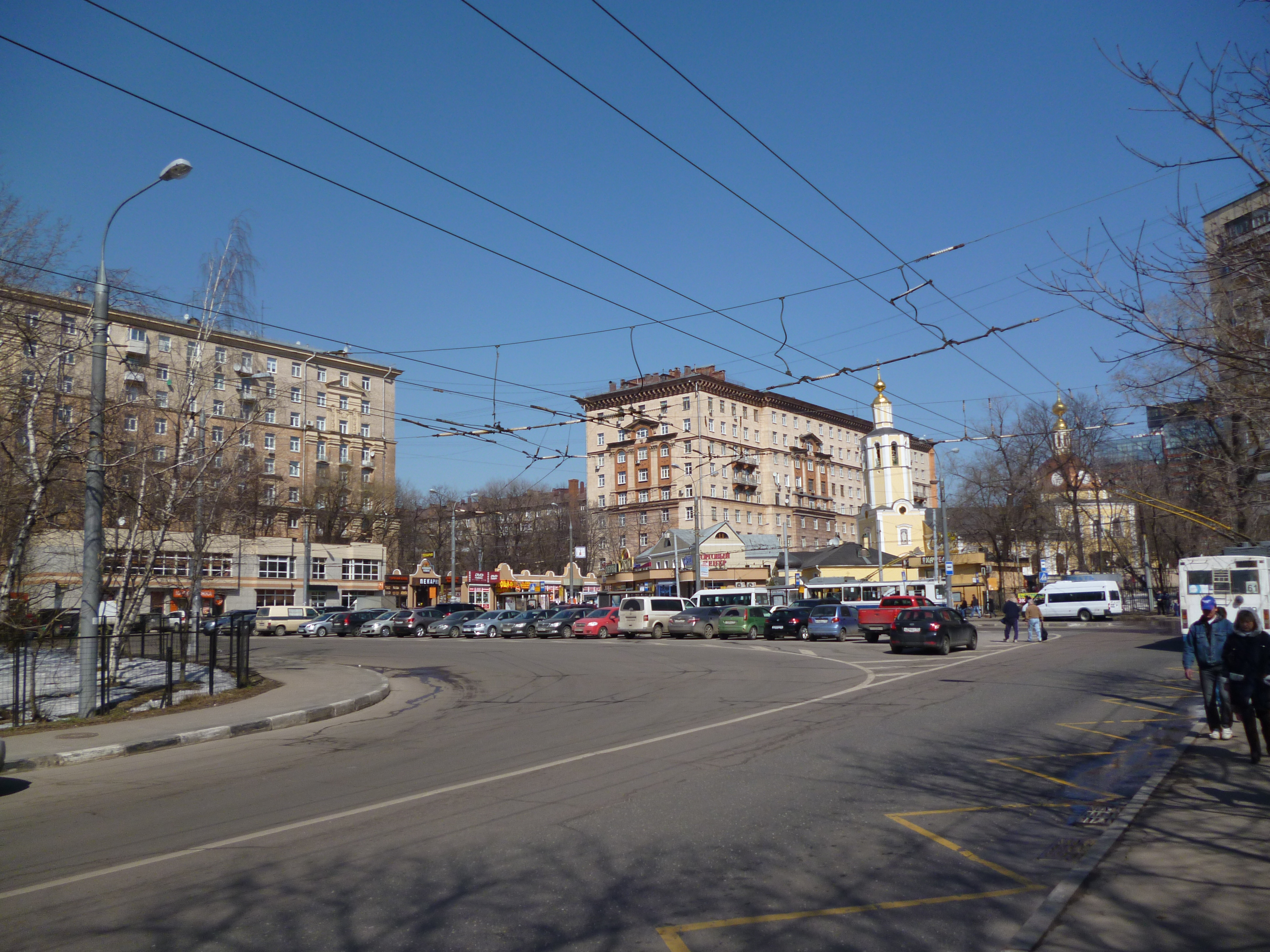 Конечная остановка автобусов и троллейбусов "станция метро Сокол"